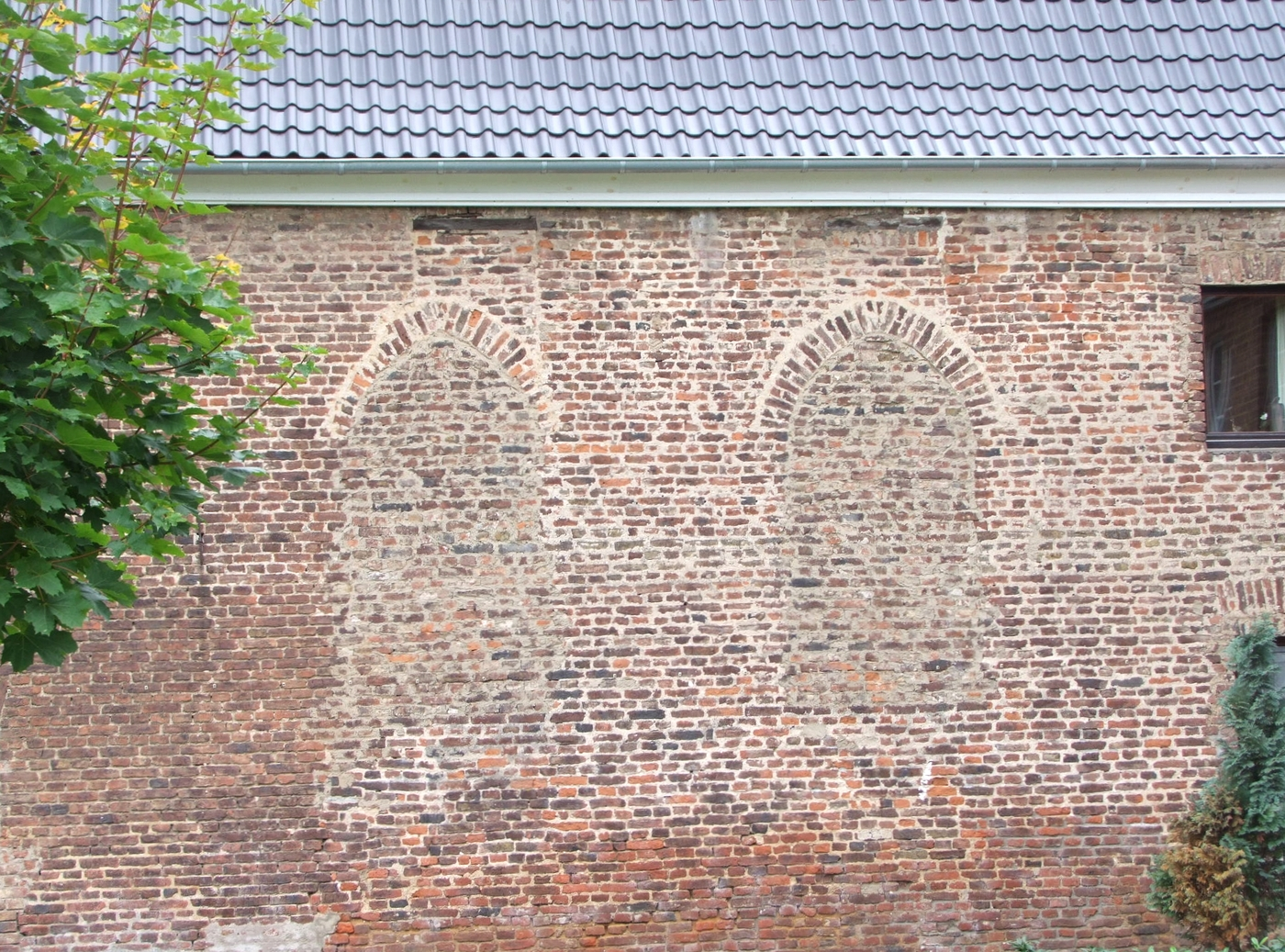 Wo früher der Synagogenraum war, das ist heute noch an zwei zugemauerten spitzbogigen Fenstern auf der Hofseite des Gelsdorfer Schlosses zu erkennen.